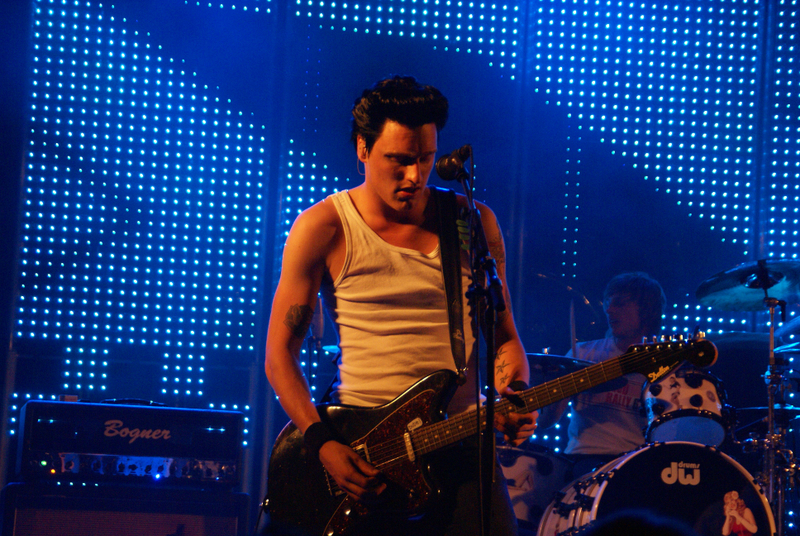 Frans "Spike" van Zoest, guitar player of Dutch band Di-rect